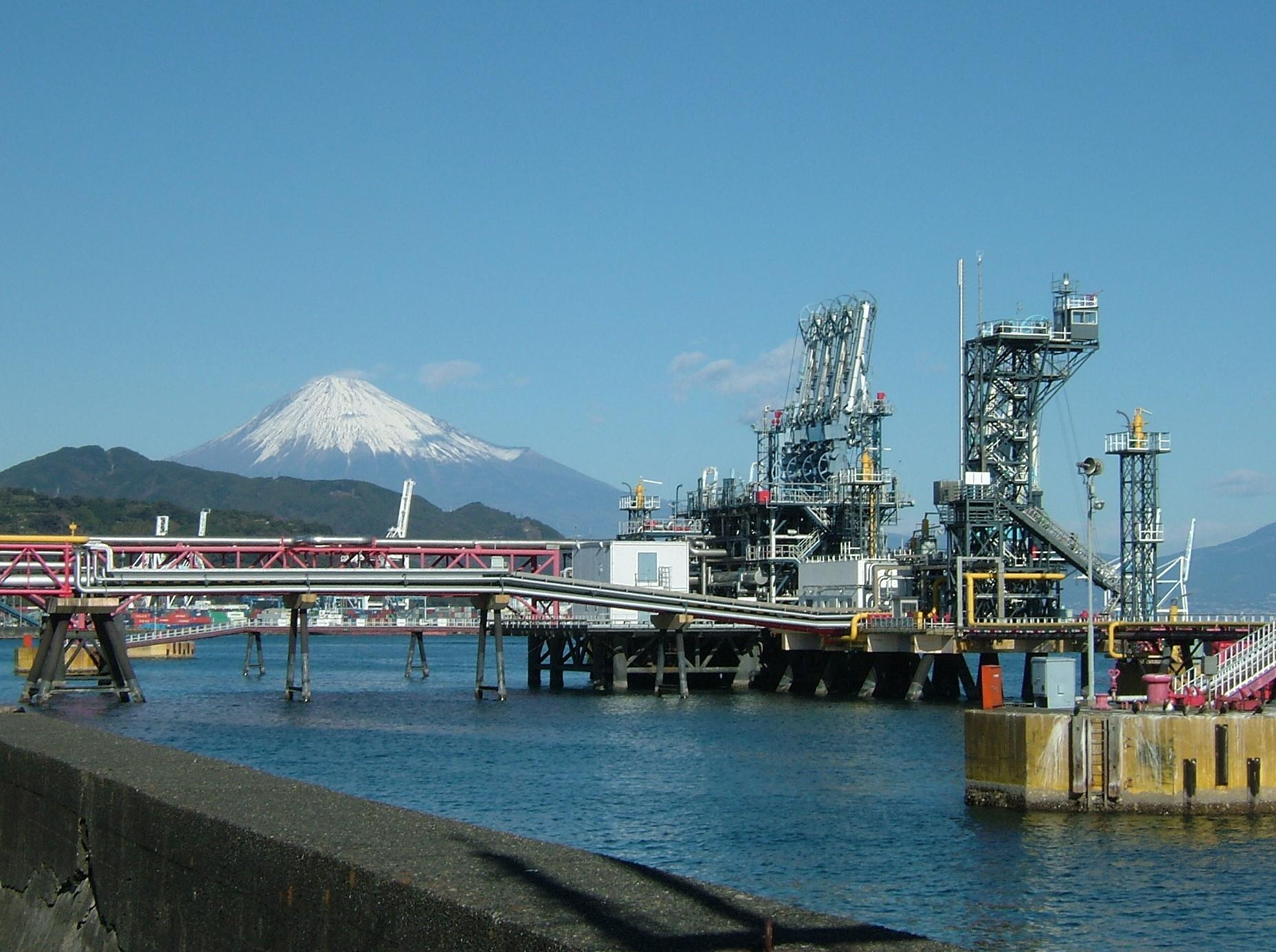 清水LNGアンローディングアームと富士山（敷地外から撮影）